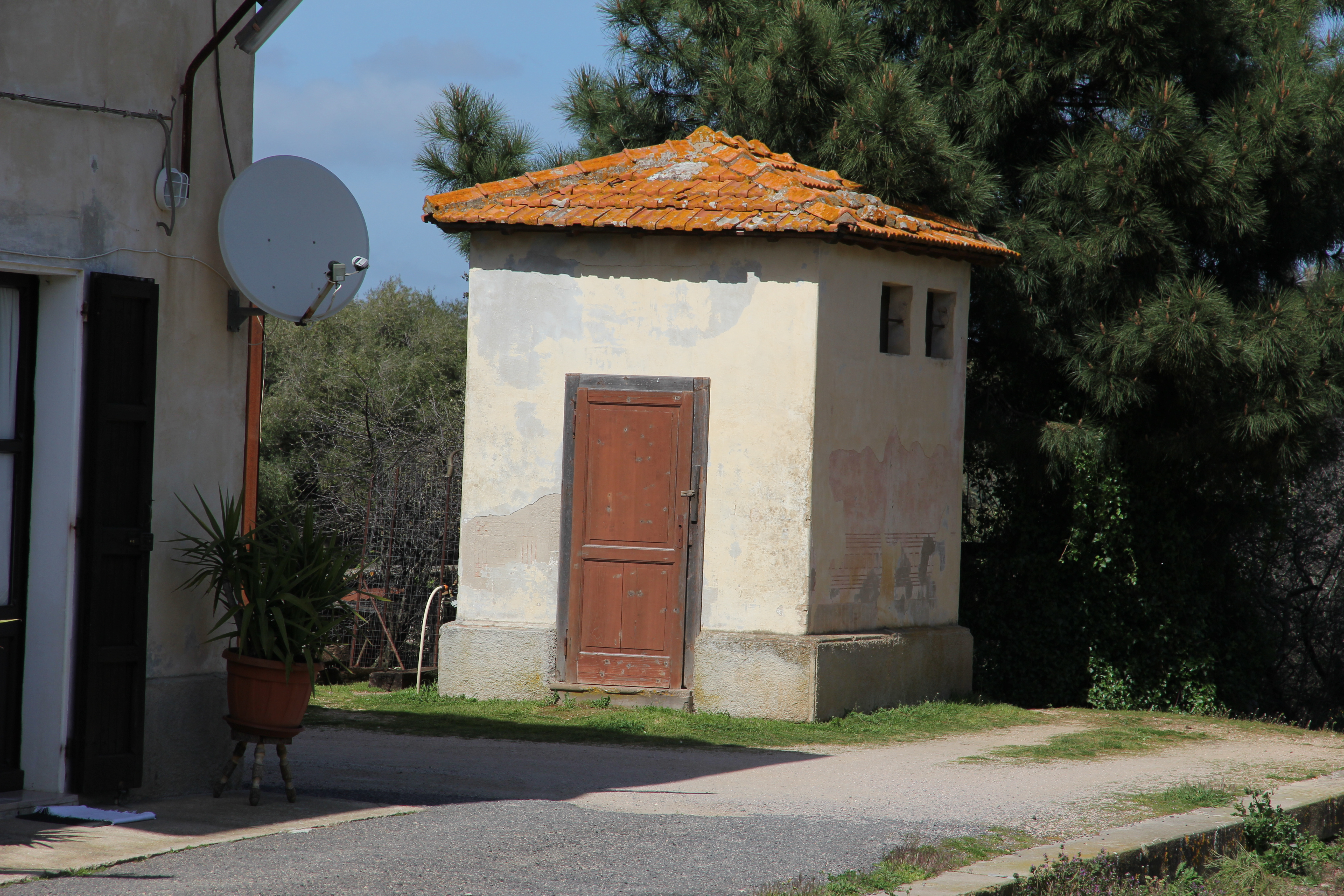 Calangianus - Stazione ferroviaria di San Leonardo